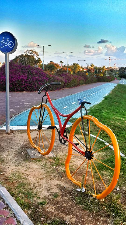 עבודת ברזל בנפחים. פסל: ישראל פרימו 200 ס"מ